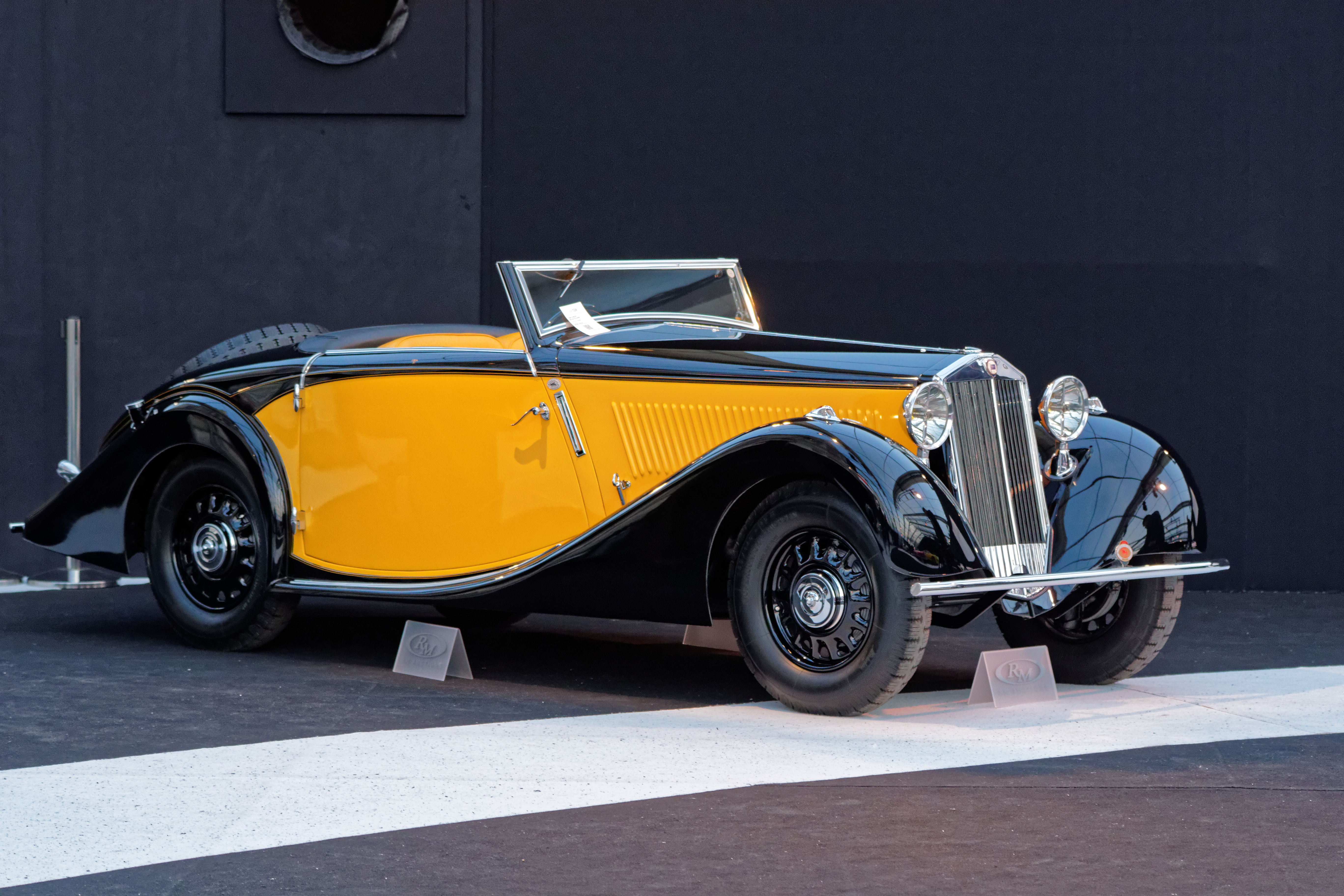 La vente aux enchères RM auctions aux pied des Invalides à Paris le 4 février 2015.